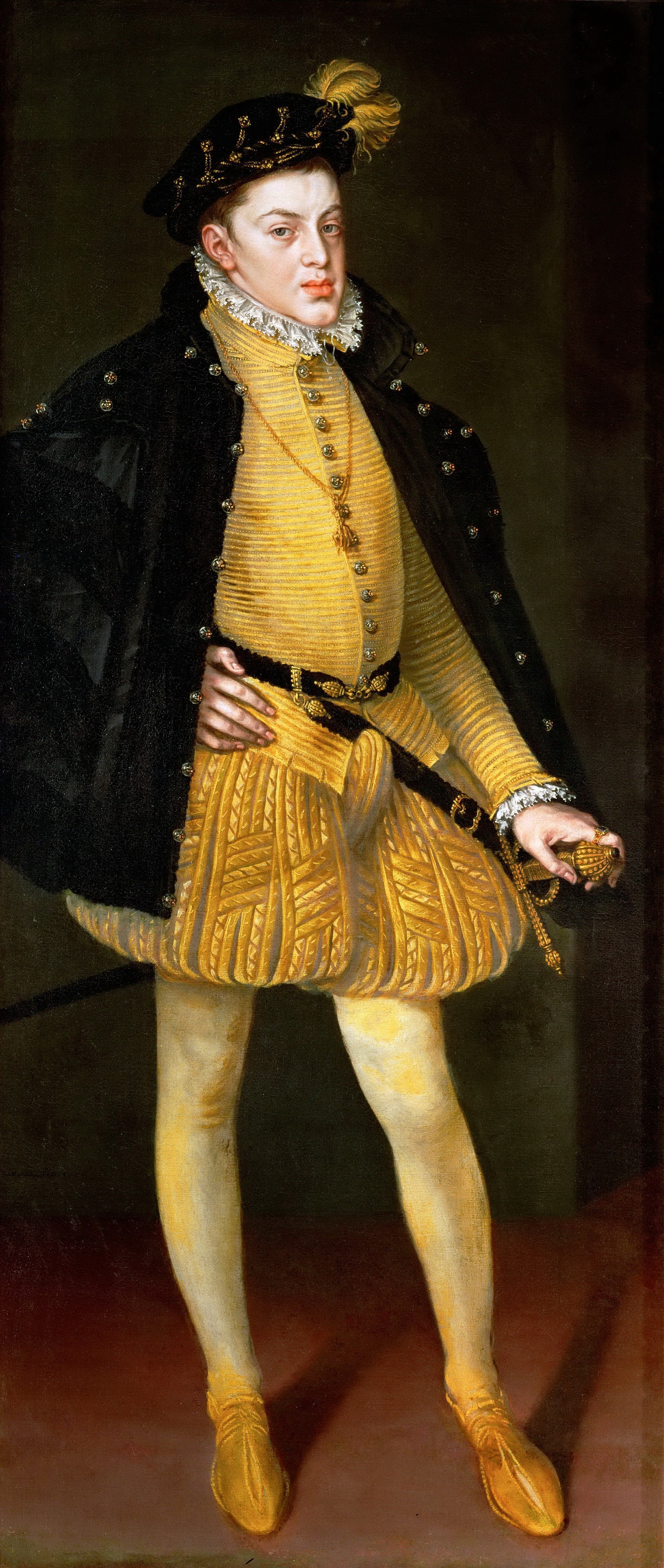 Retrato del príncipe de Asturias Carlos de Austria, que fue el hijo primogénito del rey Felipe II de España y de la reina María Manuela de Portugal, primera esposa de Felipe II.